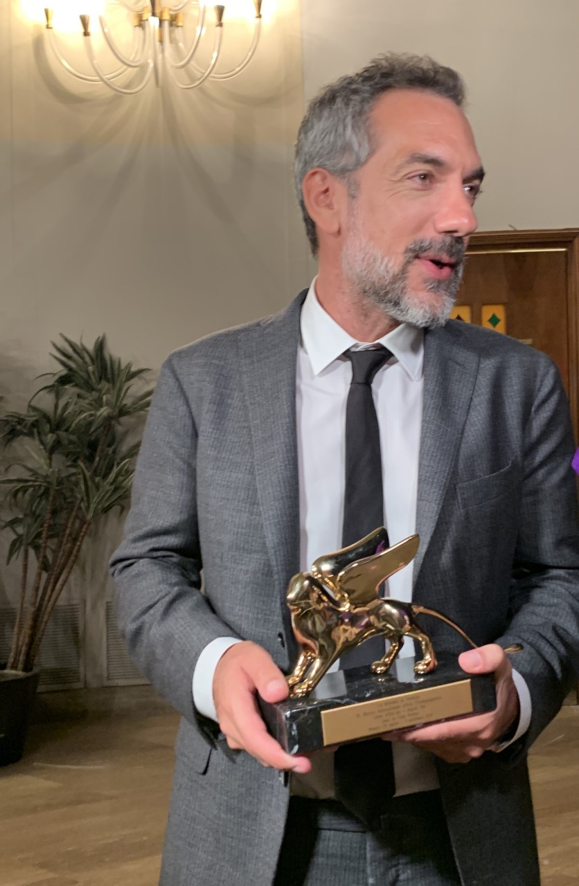 Todd Philips Venezia 2019